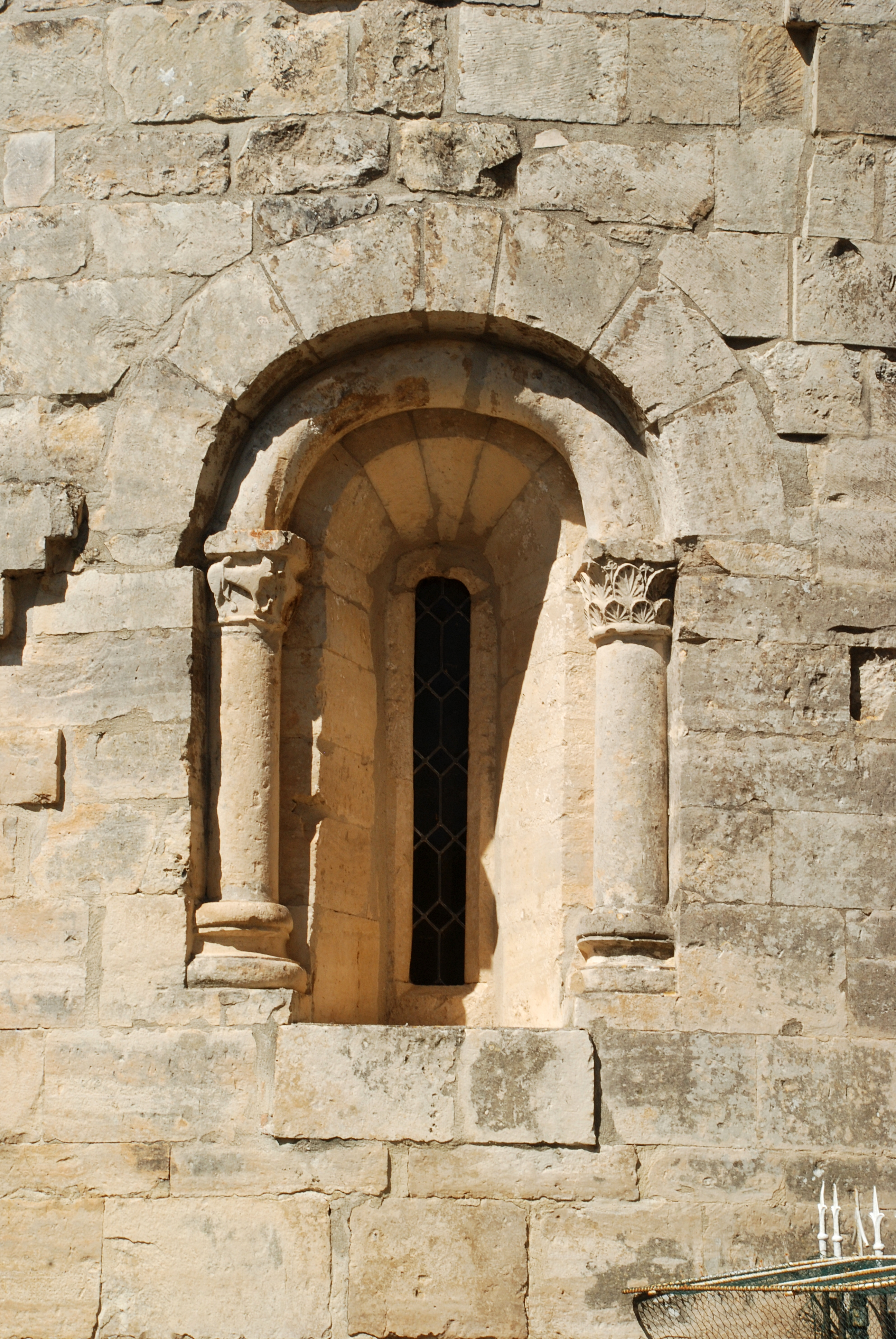 France - Hérault - Église Saint-Michel de Guzargues